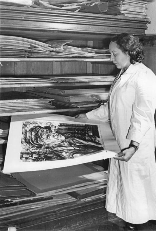 Zentralbild Höhne-Pohl 8 Motive 22.2.1955 Zum Internationalen Frauentag 1955 - Frauen als Kulturschaffende Aus der Arbeit von Professor Lea Grundig, Dresden. Frau Professor Lea Grundig hat an der Kunstakademie in Dresden den Lehrstuhl für Grafik inne. Neben ihrer beruflichen Tätigkeit ist sie Abgeordnete des Bezirktages in Dresden. UBz: Eine gewaltige Arbeit birgt im Heim von Frau Professor Grundig der Schrank mit vielen Mappen, die Frau Professor Grundig schuf.